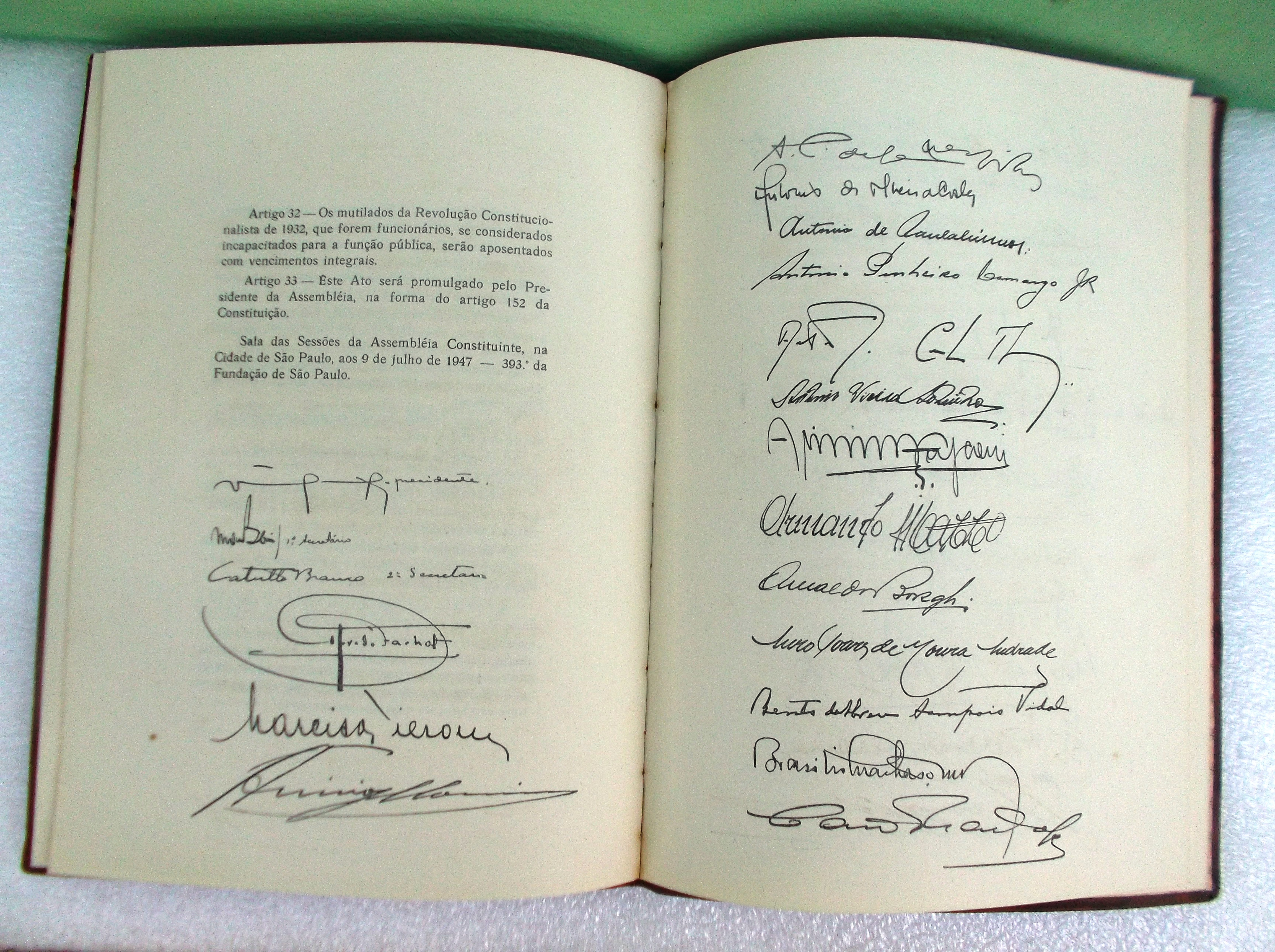 Primeiras duas páginas das assinaturas do membros da Assembleia Estadual Constitute de São Paulo que promulgou a Constituição Política do Estado de São Paulo de 1947.